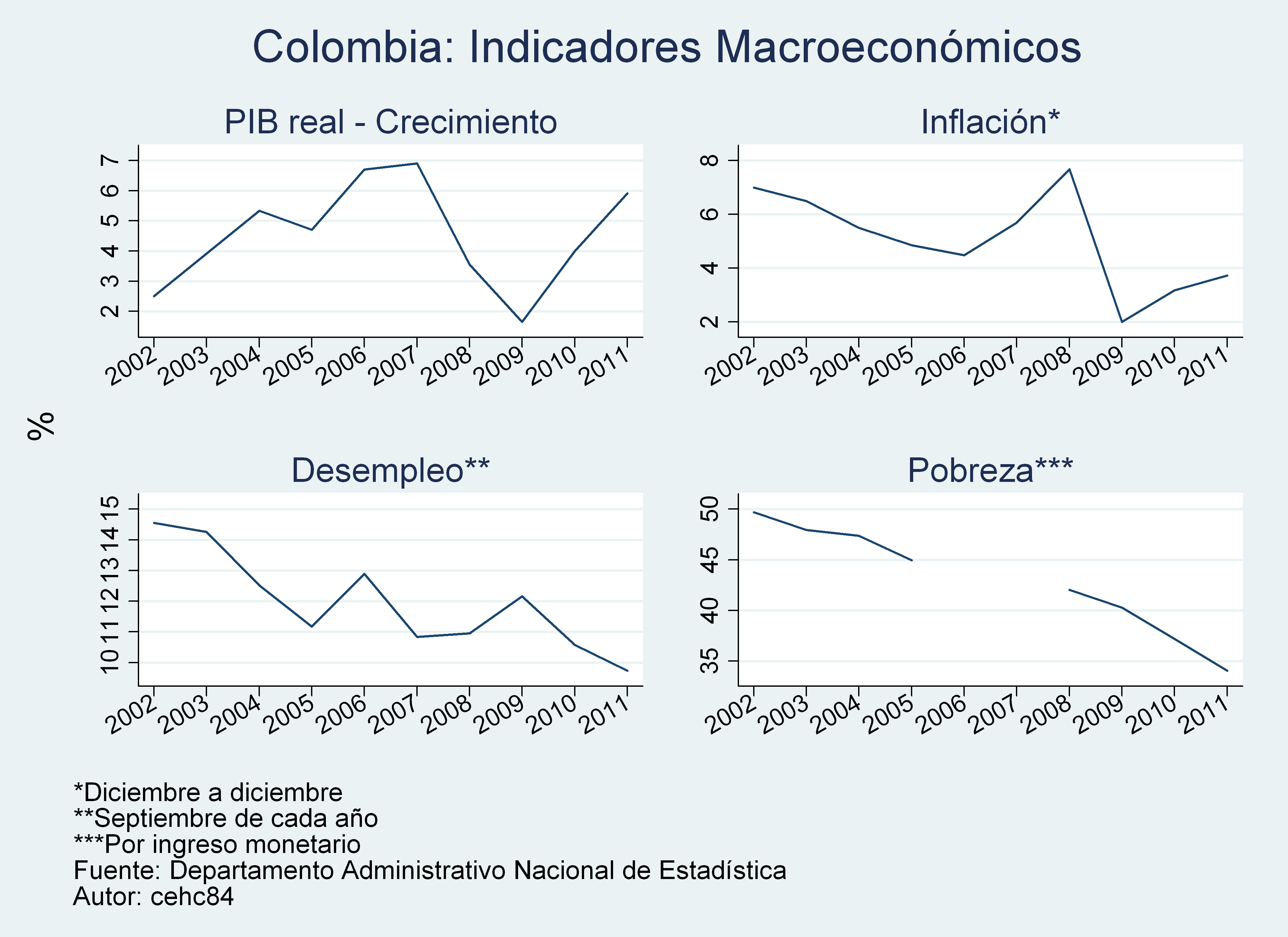 Colombia: Indicadores Macro. Crecimiento del PIB real, inflación, tasa de desempleo, tasa de pobreza. 2002-2011.